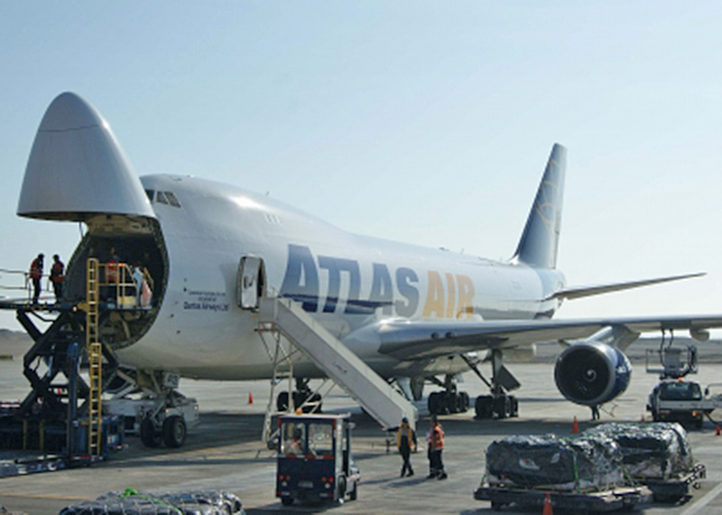 Versión carguera del Boeing 747 en el Aeropuerto Internacional Diego Aracena